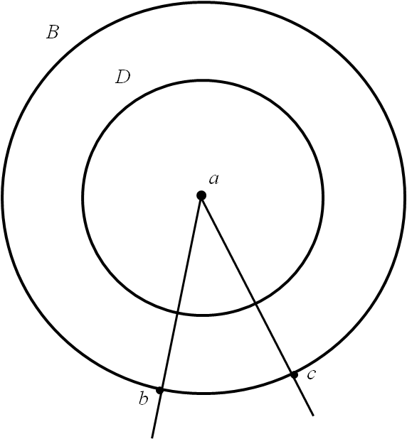 Problème des cercles concentriques chez Duns Scot.